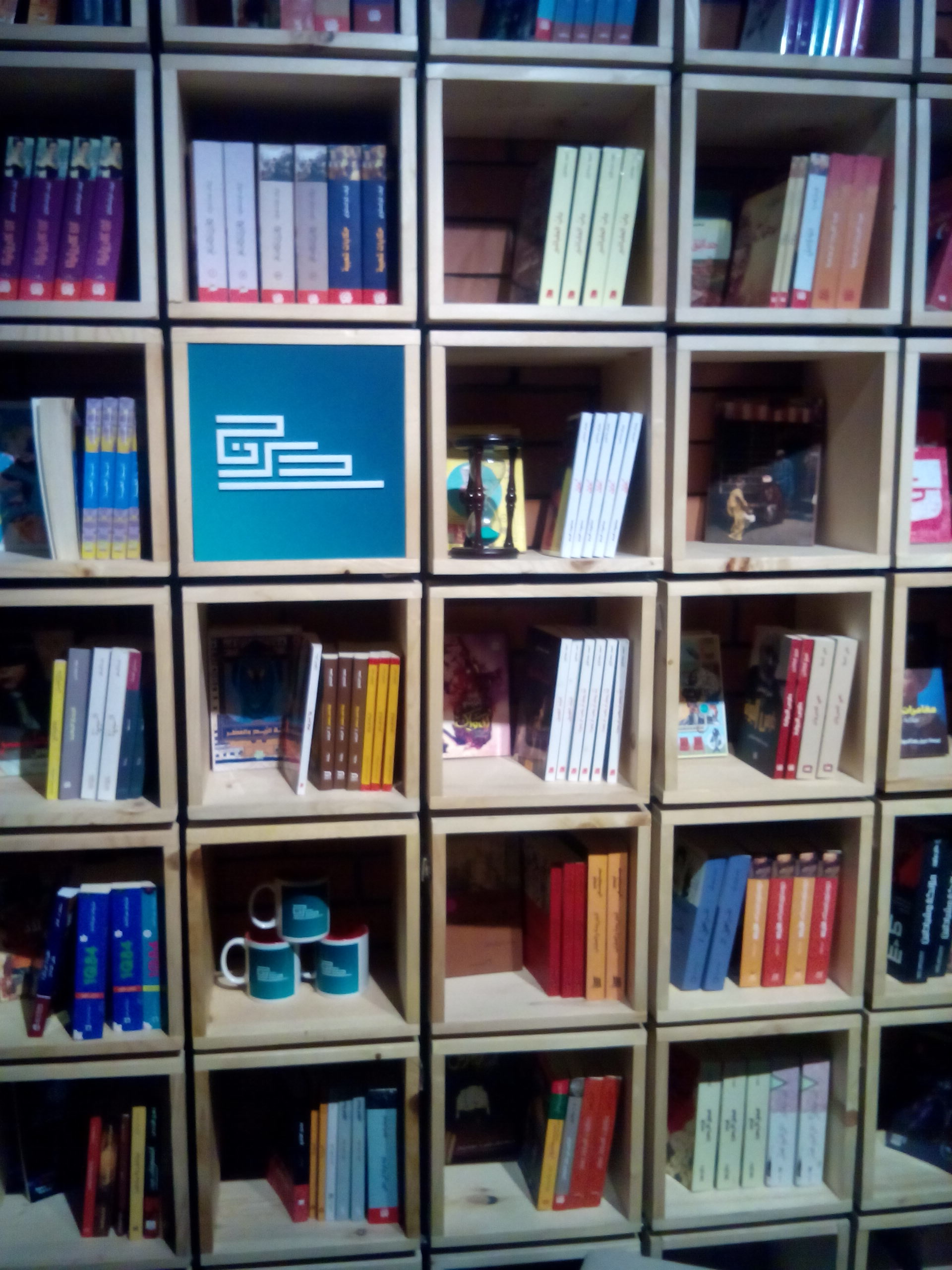 مكتبة تحوي كتبا منوعة في احدى قاعات لمنتدى في بغداد